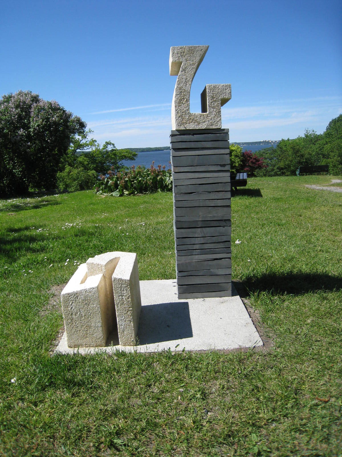 Iréne Vestman, Cipher, Görvälns skulpturpark, Järfälla kommun, foto juni 2015.